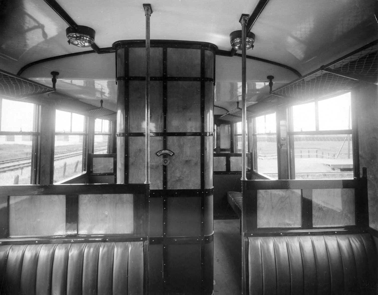 Foto van het interieur van de Omc 913 voor de Nederlandse Spoorwegen op het terrein van Allan in Rotterdam. Foto gemaakt door Allan. Het object, uitgegeven door een instantie, is vanaf 70 jaar na publicatie niet meer auteursrechtelijk beschermd.